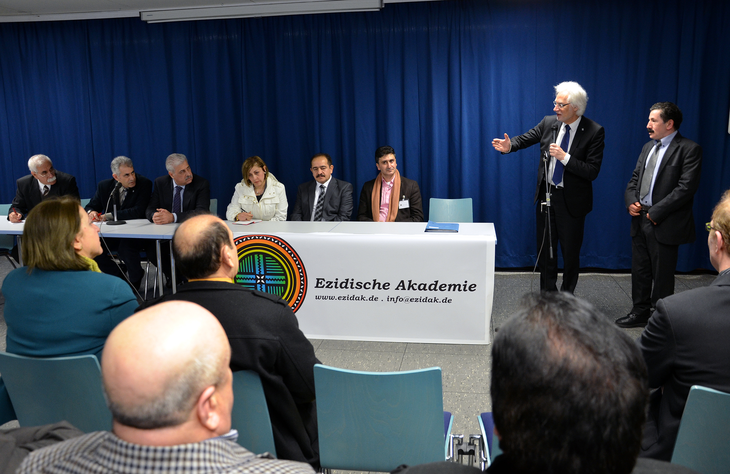 Zu Beginn des Gastvortrags mit anschließender DiskussionSituation der Eziden und anderer religiöser Minderheiten im Bezirk Ninive sprach Bernd Strauch, 1. Bürgermeister und Stellvertreter des Oberbürgermeisters von Hannover, ein Grußwort ...